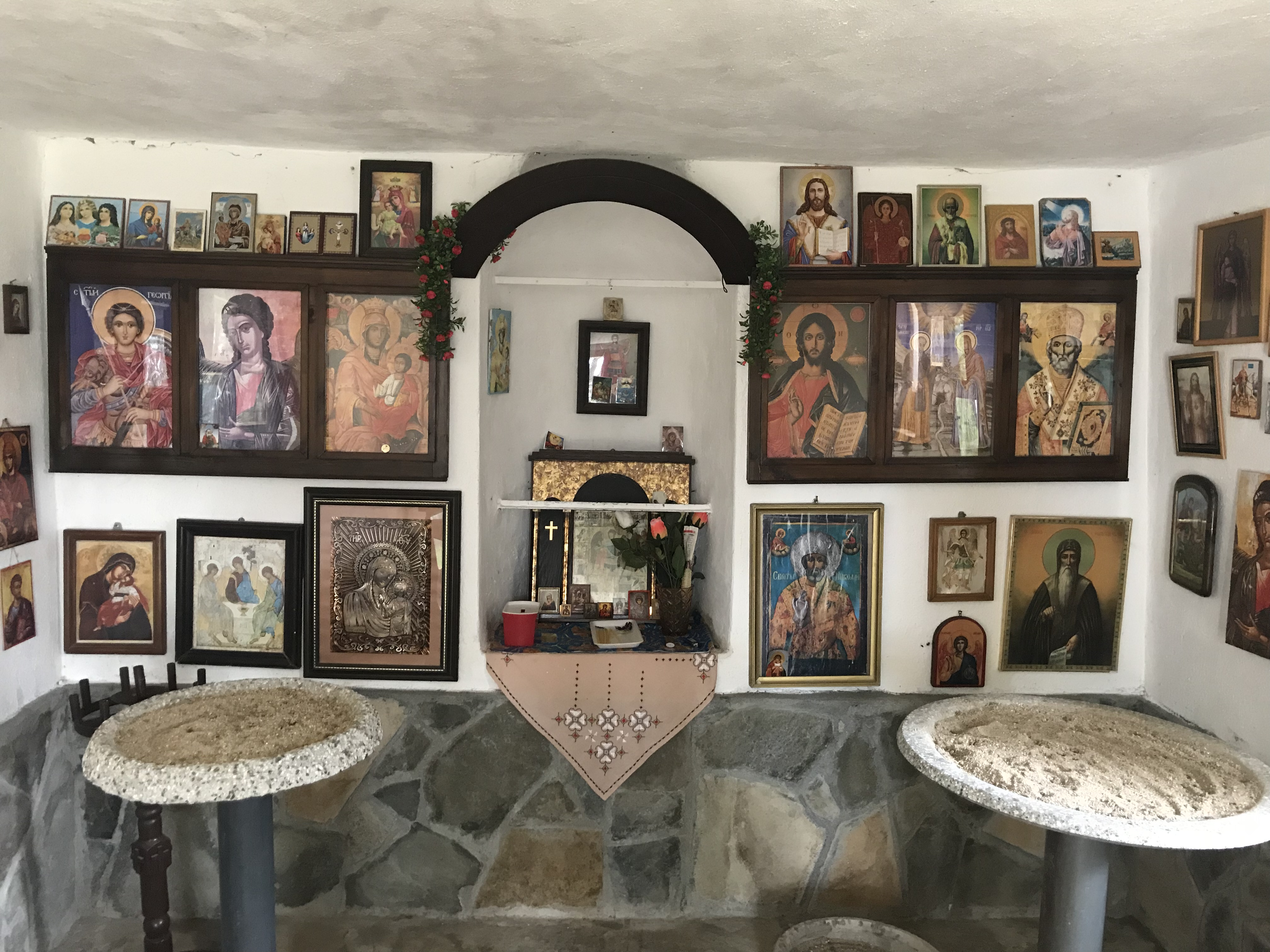 Иконостас на “Св. Архангел Михаил”,с. Бойково